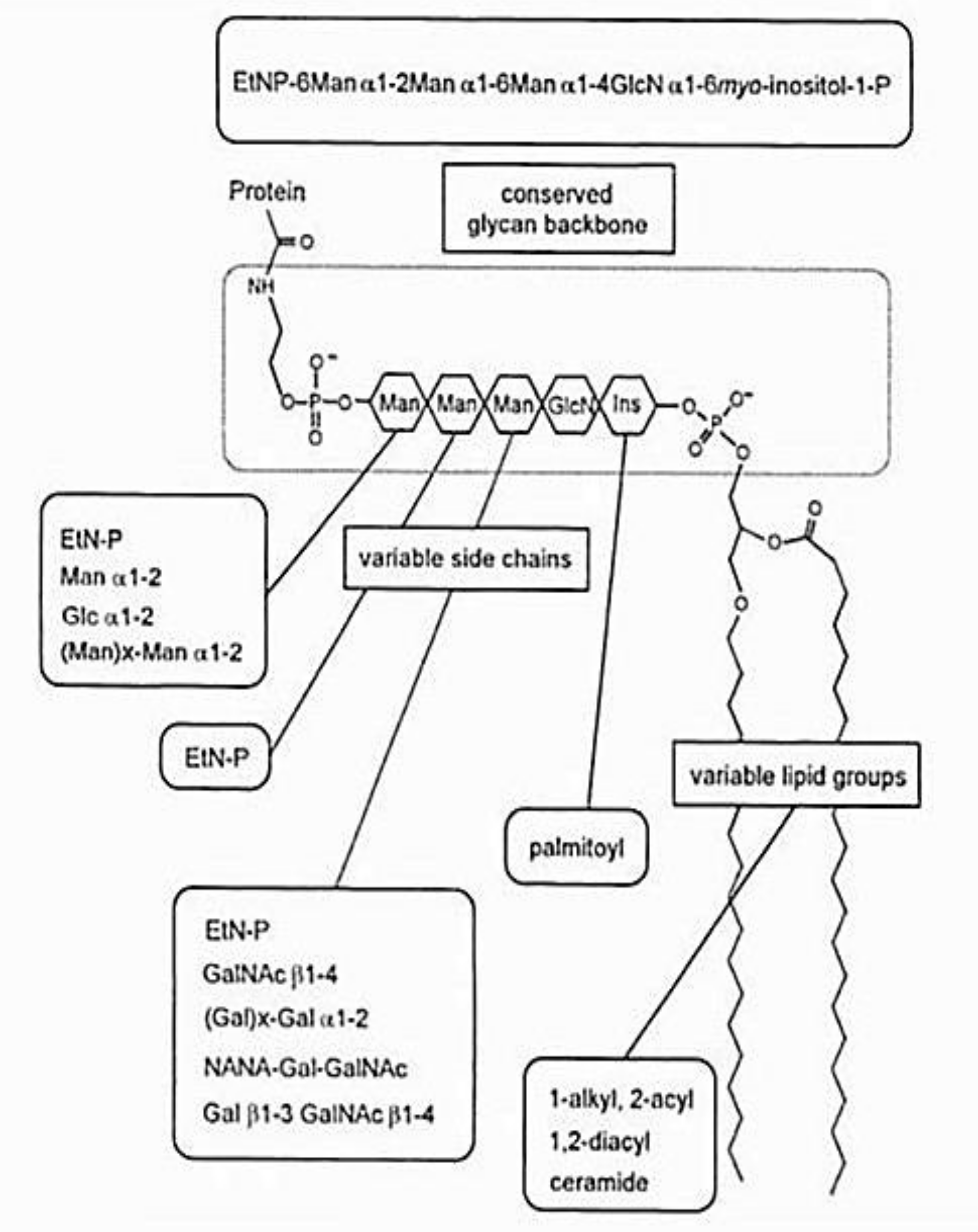 Современное представление о химическая структура консервативного участка ГФИ-якоря и его многочисленных биологических вариациях